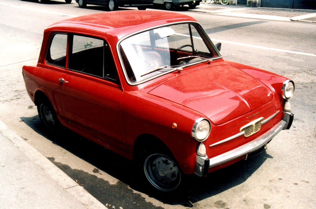 Autobianchi Bianchina Berlina Quelle: Harald H. Linz Fotograf: Harald H. Linz Mit Genehmigung von Harald. H. Linz für Wiki eingestellt.